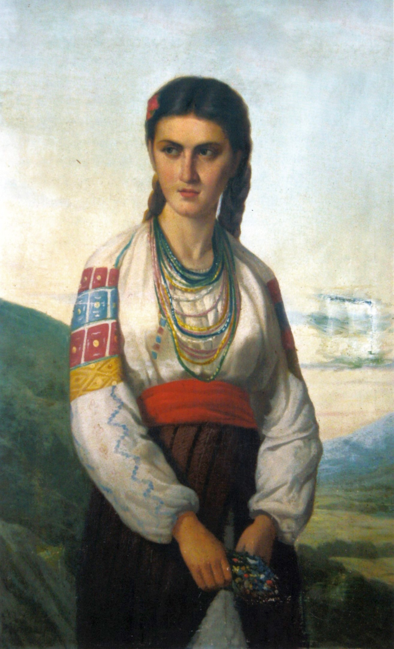 Petru Verussi - Ţărancă, ulei pe pânză, deţinător: Muzeul Naţional de Artă din Bucureşti.